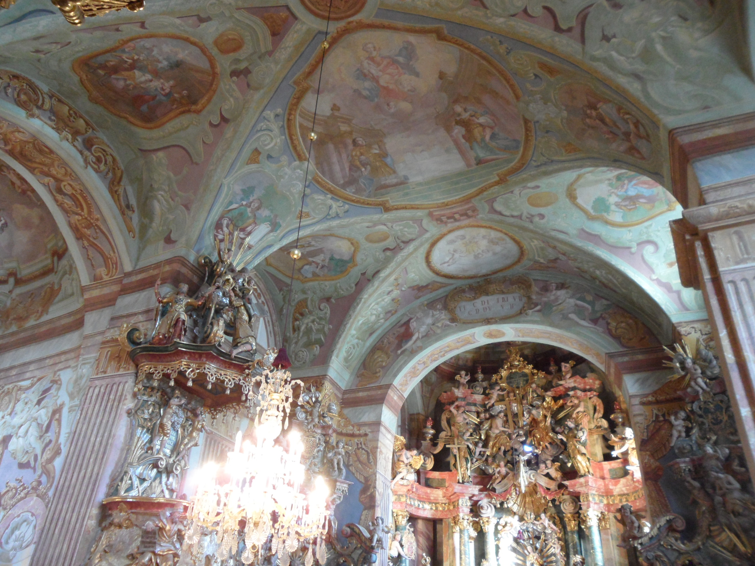 Barokna crkva